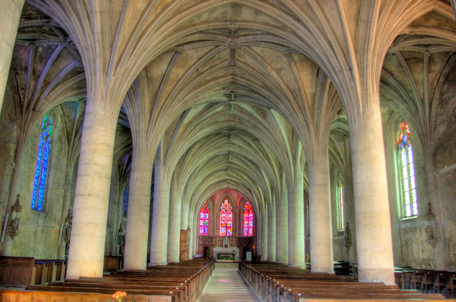 Église St Gorgon de la ville de Varangeville (54)